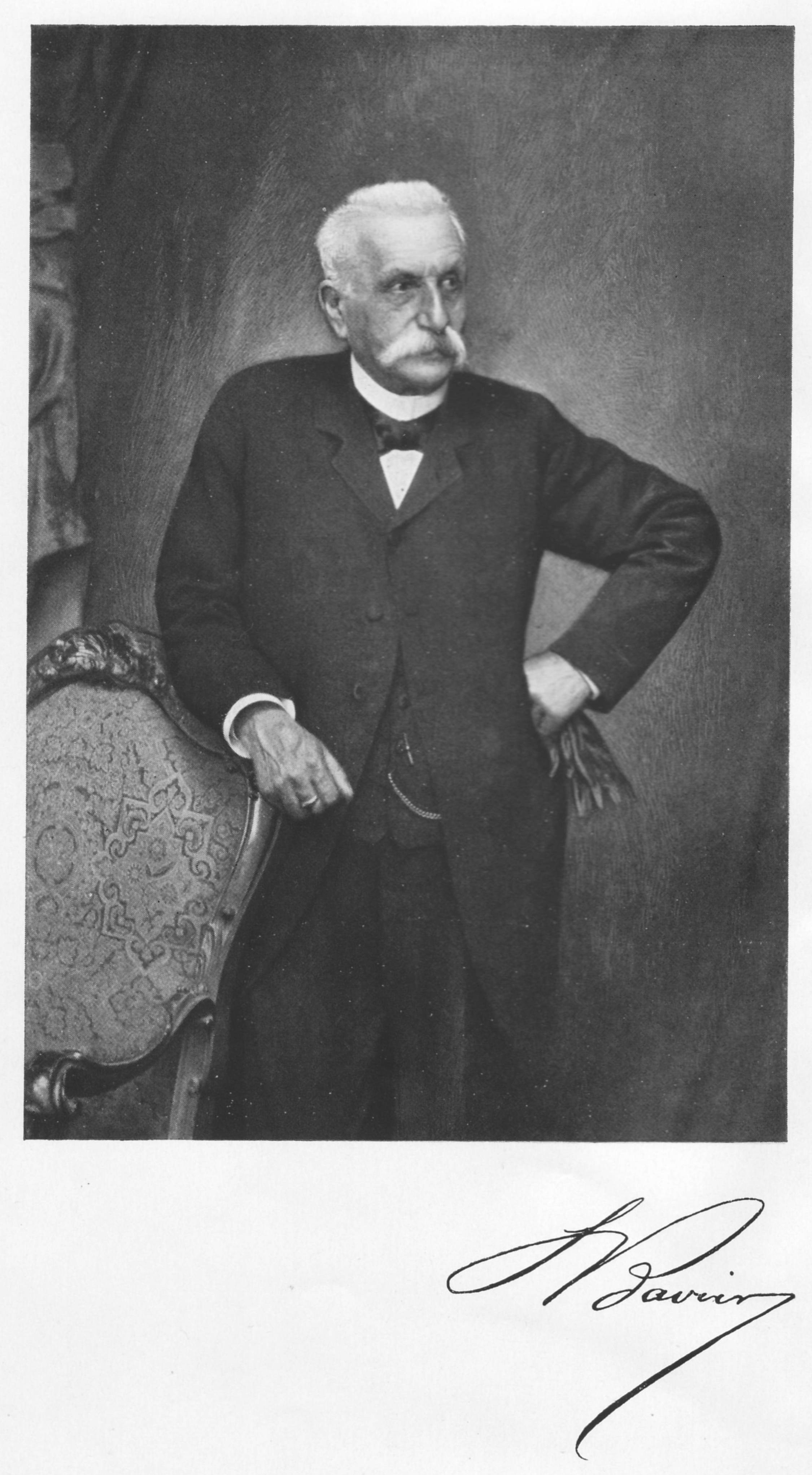 Simeon Bavier, Schweizer Bundesrat